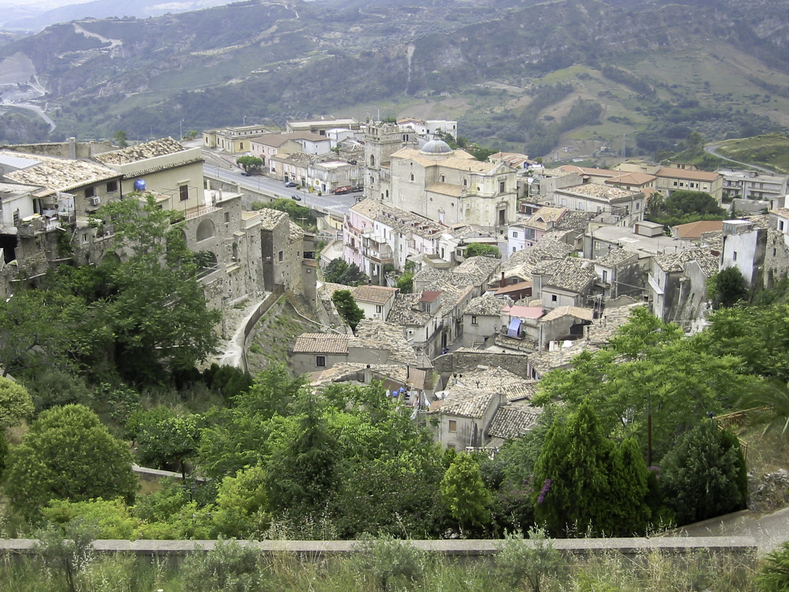 Calabria Stilo